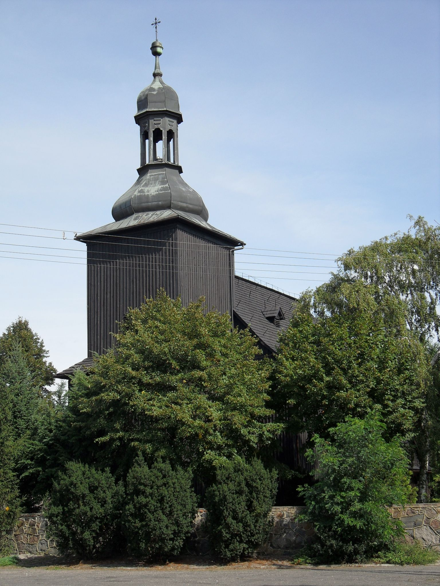 Czerlejno - kościół pw. NMP Wniebowziętej (zabytek nr 2432/A)